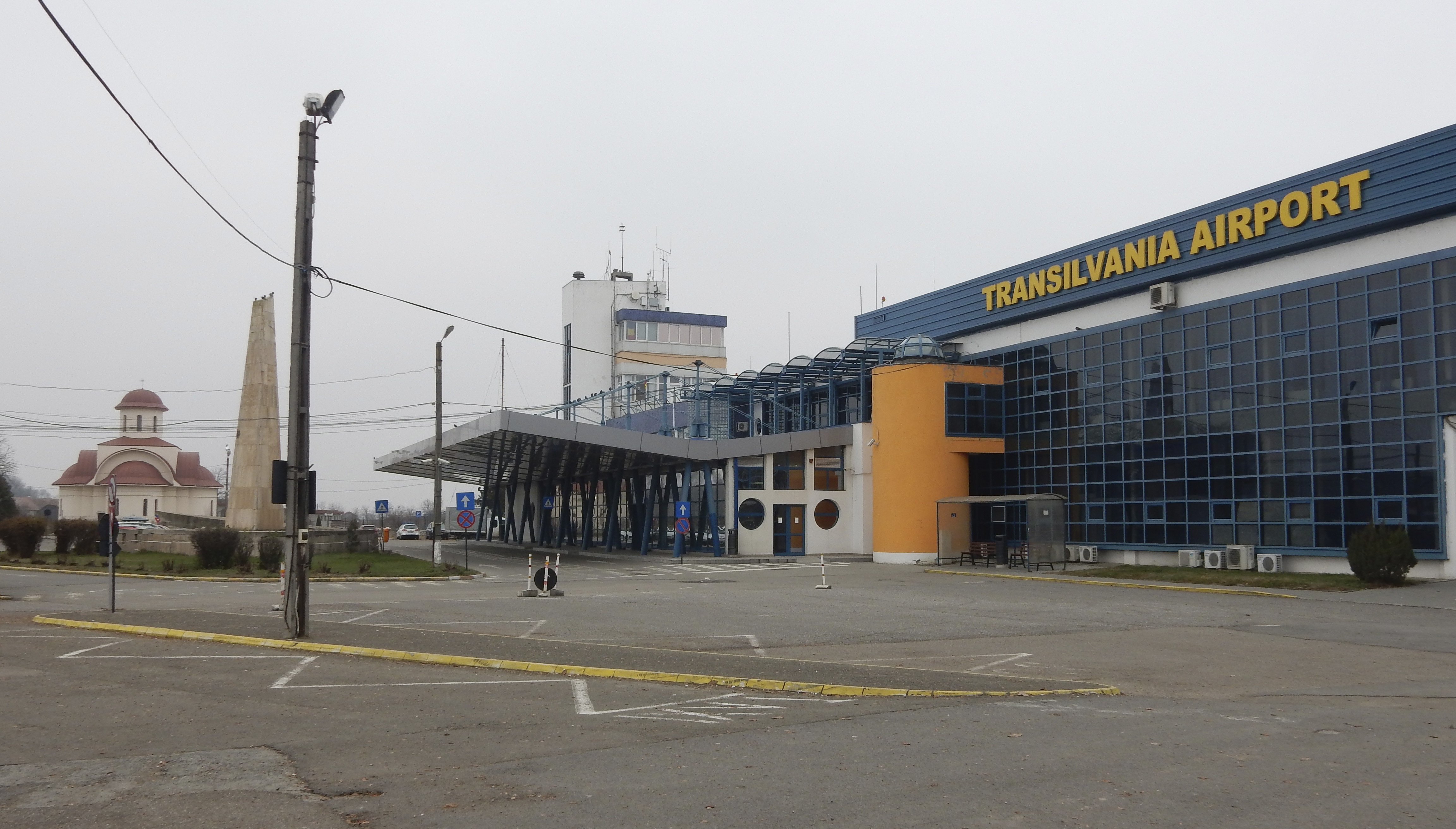 Transilvania Airport, Târgu Mureș, Romania